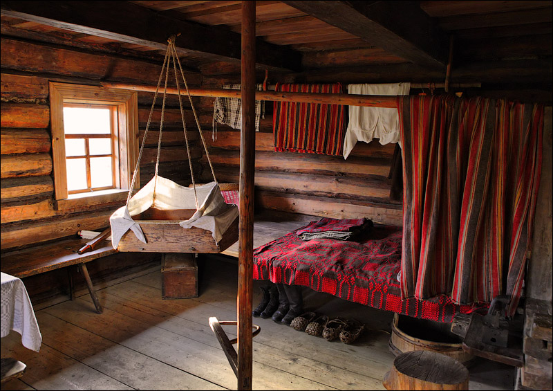 Строчыца. Музей народнага дойлідства